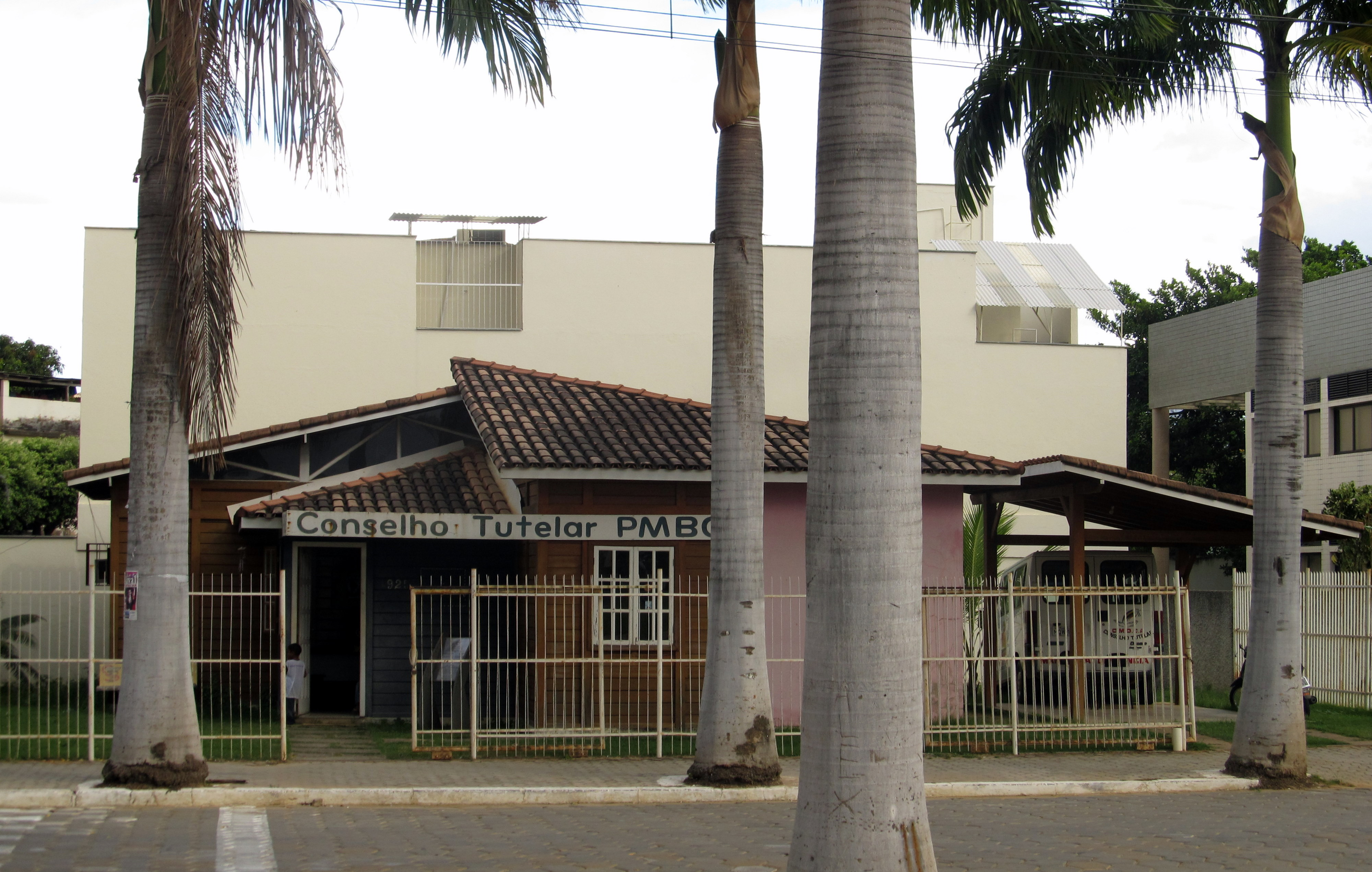 Vista frontal do Conselho Tutelar de Baixo Guandu.